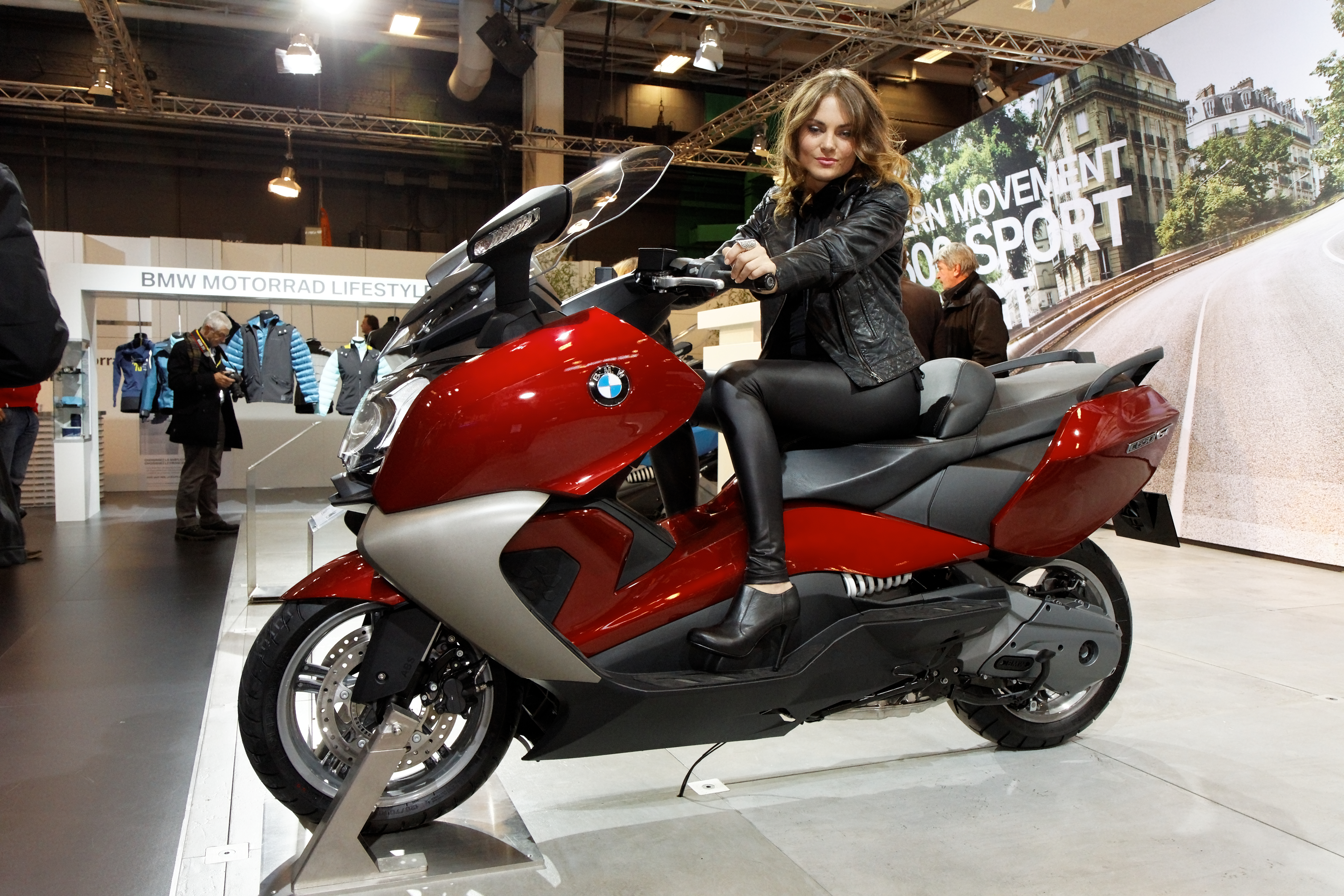 BMW - C 650 GT et hôtesse